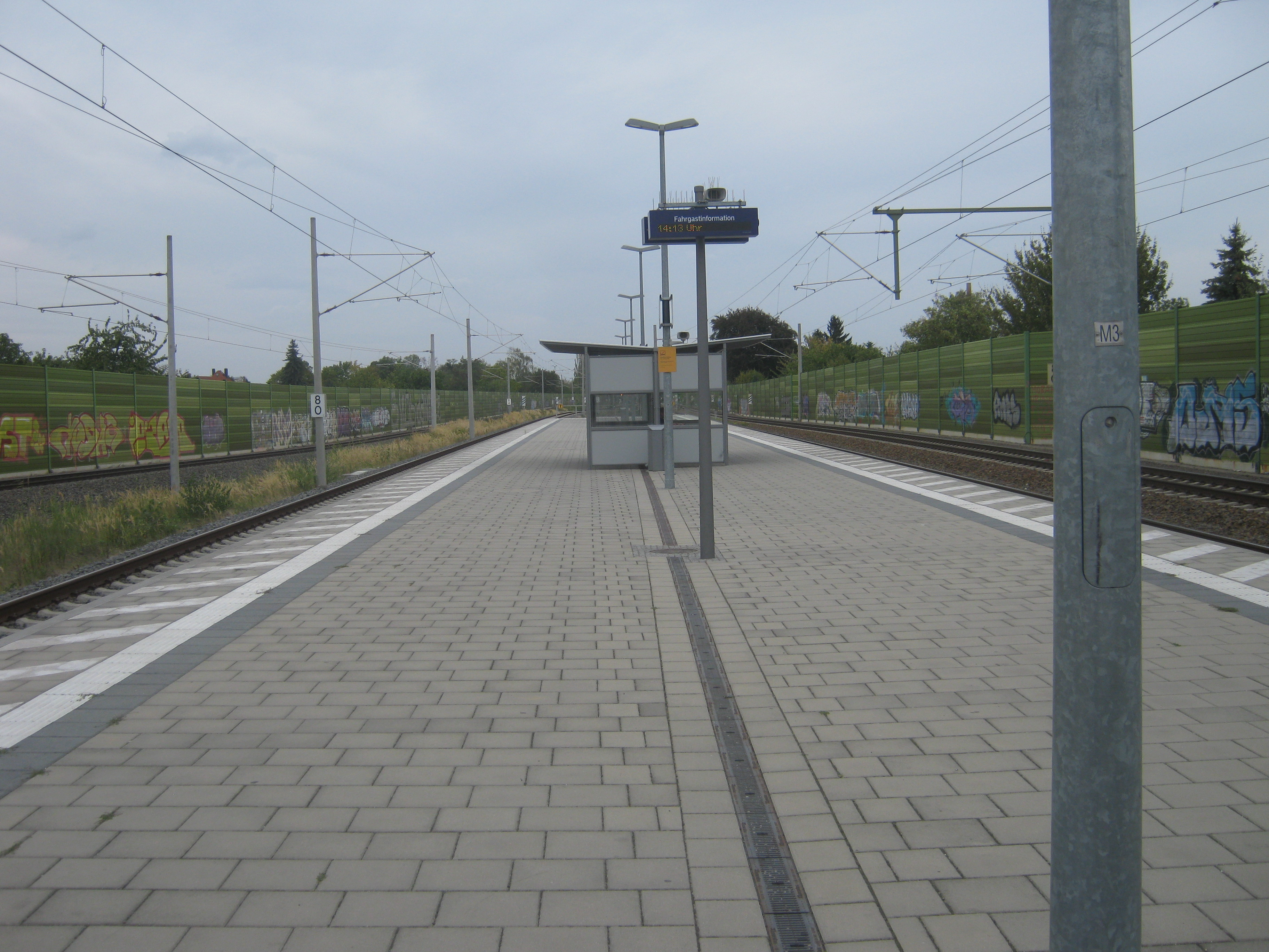 Im Zuge des City-Tunnel-Baus und der Einführung der S-Bahn Mitteldeutschland wurde auch der Bahnhof Markkleeberg-Großstädeln umgebaut mit dem Ergebnis, dass es sich nun um einen Haltepunkt handelt. Zudem hat auch nur noch die Bahnstrecke Leipzig–Hof Anschluss an den Haltepunkt.